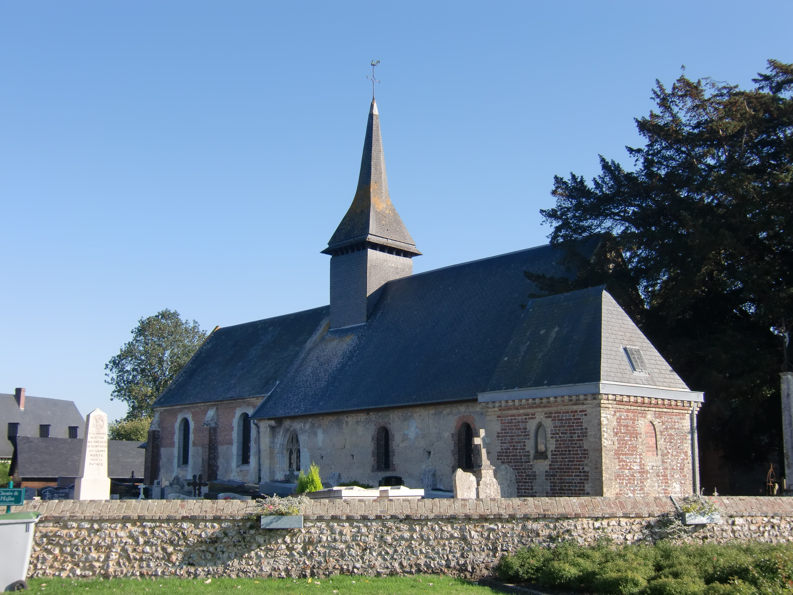 Eglise de Saint-Ouen des Champs (Eure, Normandie, France)